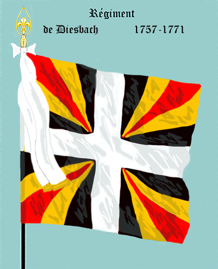 Ordonnanzfahne eines Fremdenregiments im königlich französischen Dienst. (Schweizer Regiment) - Entnommen und überarbeitet aus: „LES UNIFORMES ET LES DRAPEAUX DE L'ARMÉE DU ROI“ Marseille 1899. - Drapeau d'Ordonnance d' un régiment étranger au service française (régiment suisse.)